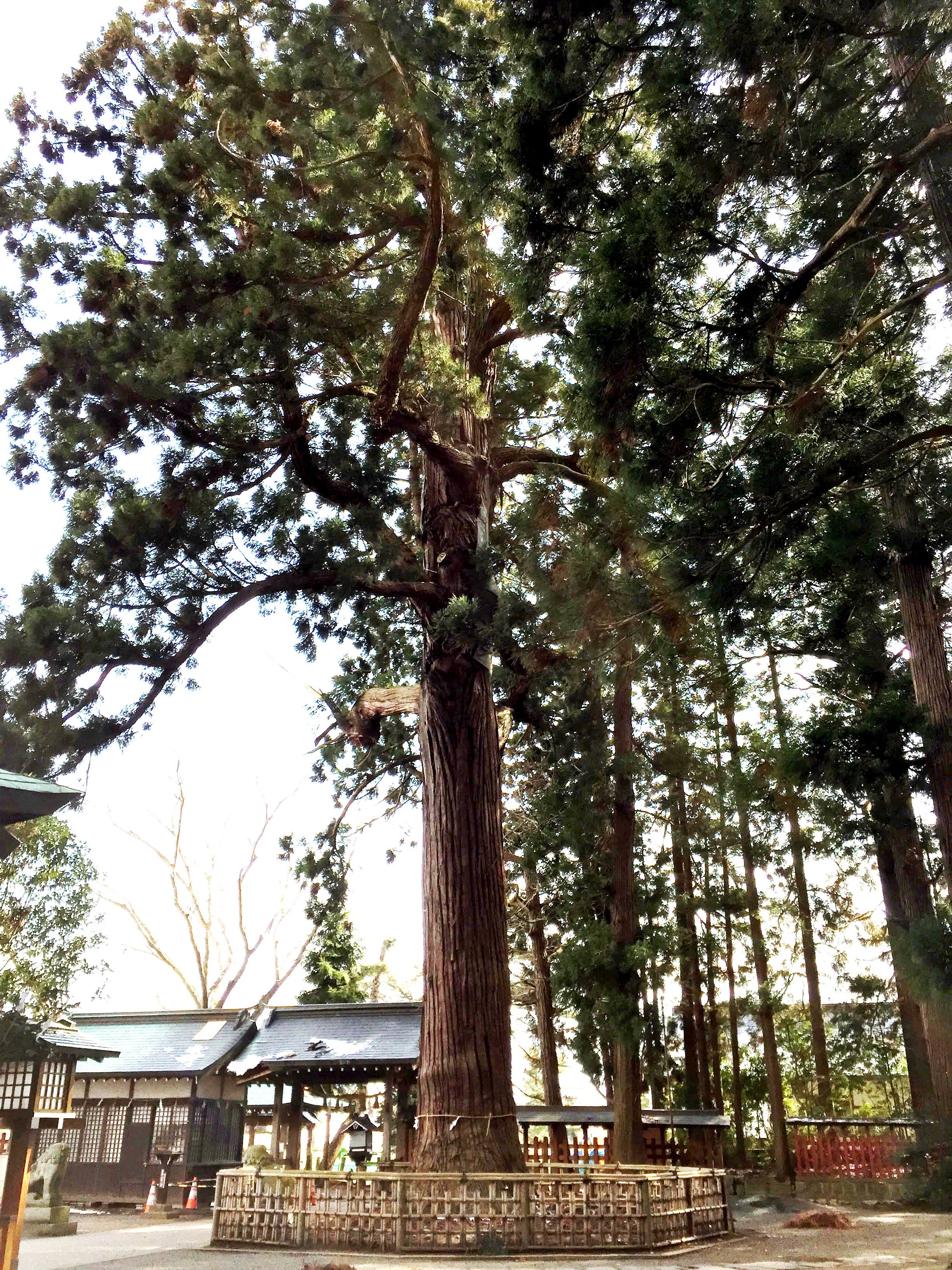 源八幡太郎義家が境内に陣を構え、持っていた箸を地面に刺し育ったとの伝説が残る